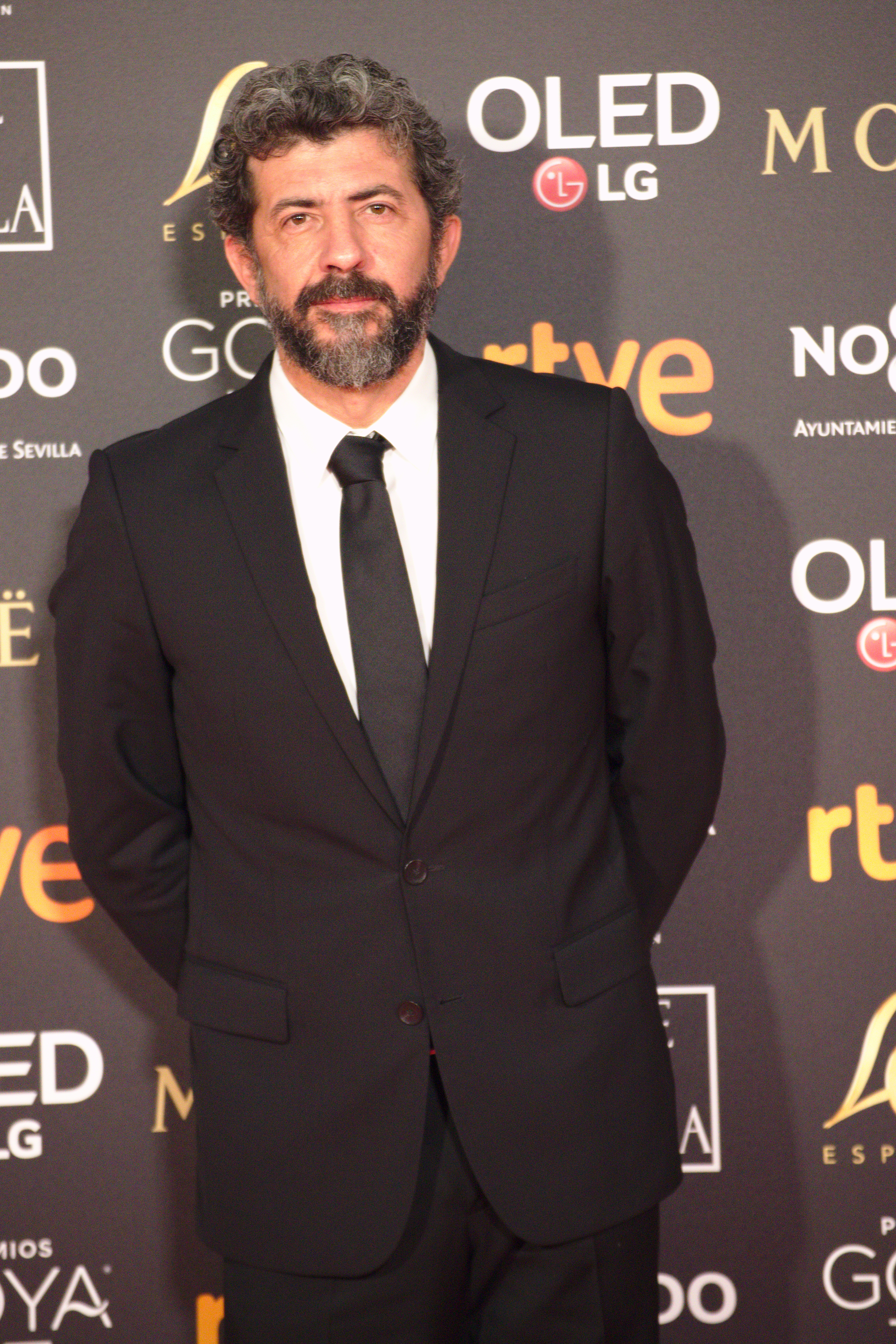 Alberto Rodriguez en la alfombra roja de los Premios Goya celebrados en Sevilla en Febrero 2019